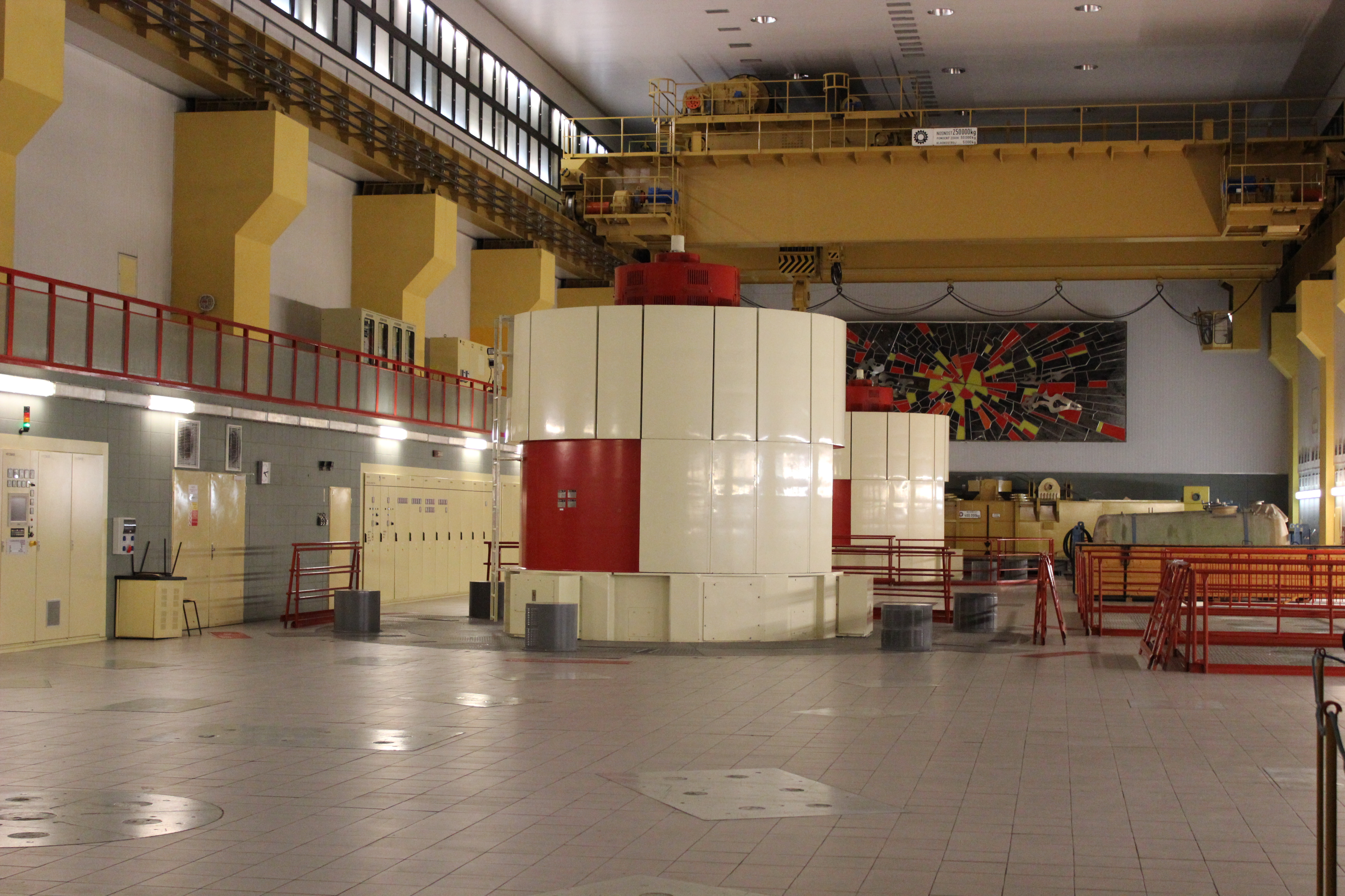 Kaverna v zázemí přečerpávací hydroelektrárny Dlouhé Stráně.